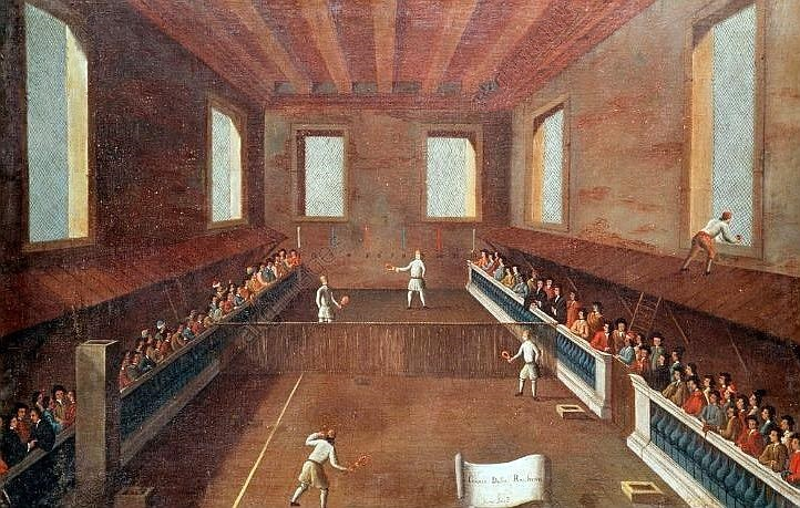 jeu de courte paume au XVIIIe siècle